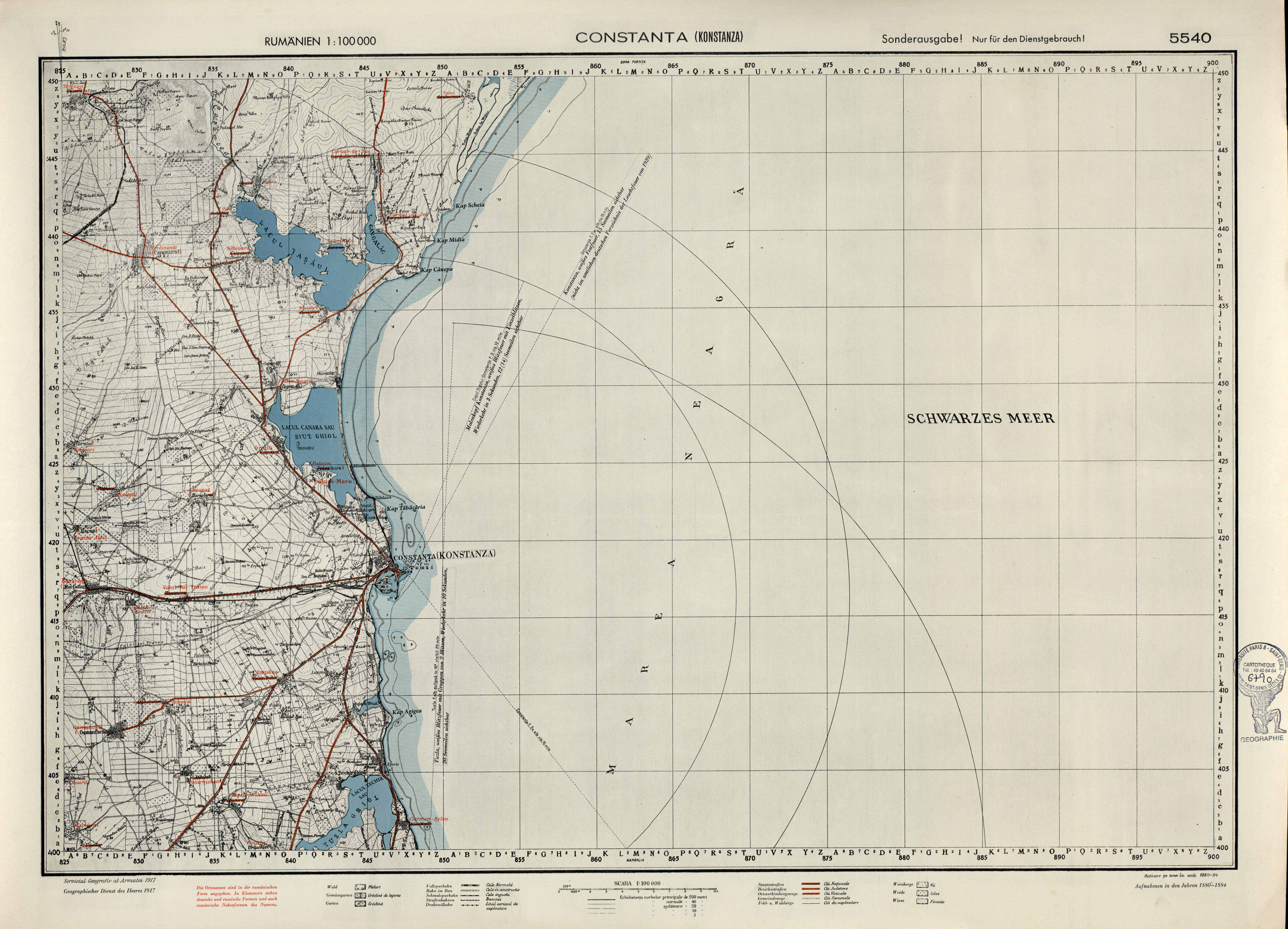 Carte marine allemande de 1917 d'après une carte roumaine : ConstantaRomână: Hartă de marină germană din 1917 (după o hartă de stat-major românească) din arhiva armatei Mackensen, arhivată ulterior la biblioteca Inst. de Geografie din Paris, 193 rue St-Jacques, V-e arrt.